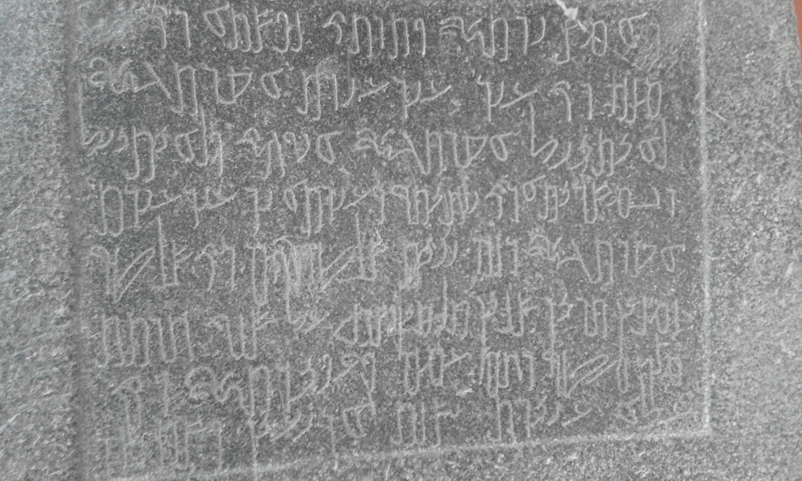 Inscription funéraire nabatéenne en basalte (37 ap. J.C., Madaba Jordanie). Musée du Louvre